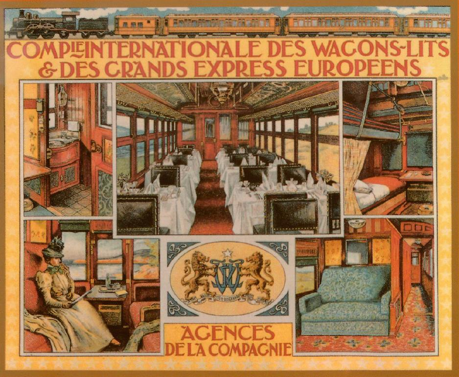 CIWL-Prospekt 1989